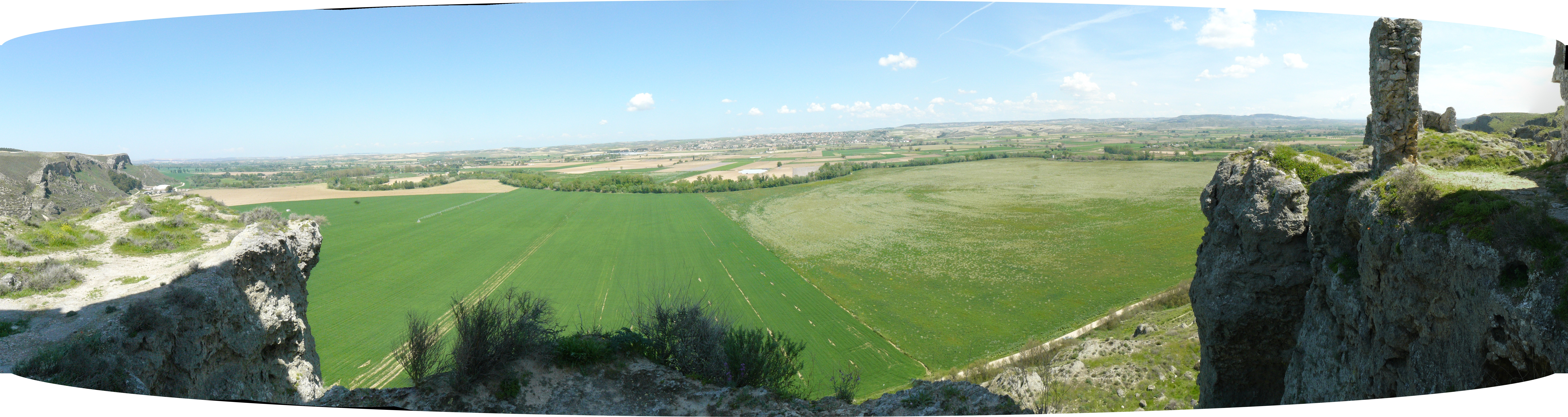 Vistas desde el Castillo de Oreja, vega del Tajo.